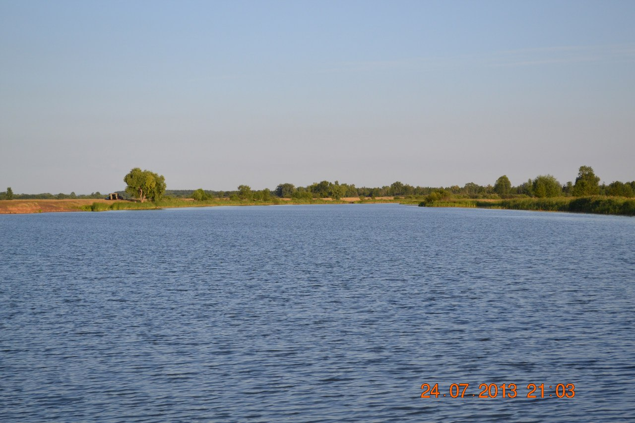 Кызылга